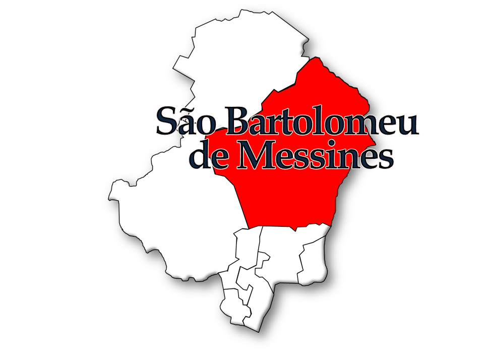 Censos 1864/2011